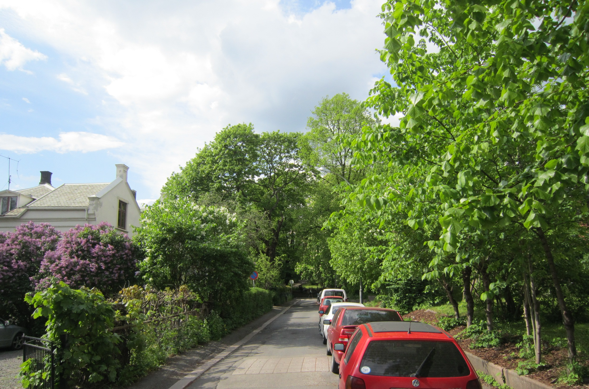 Gustavs gate i Oslo